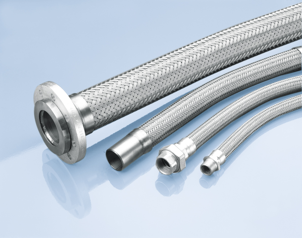 Ringwellschläuche